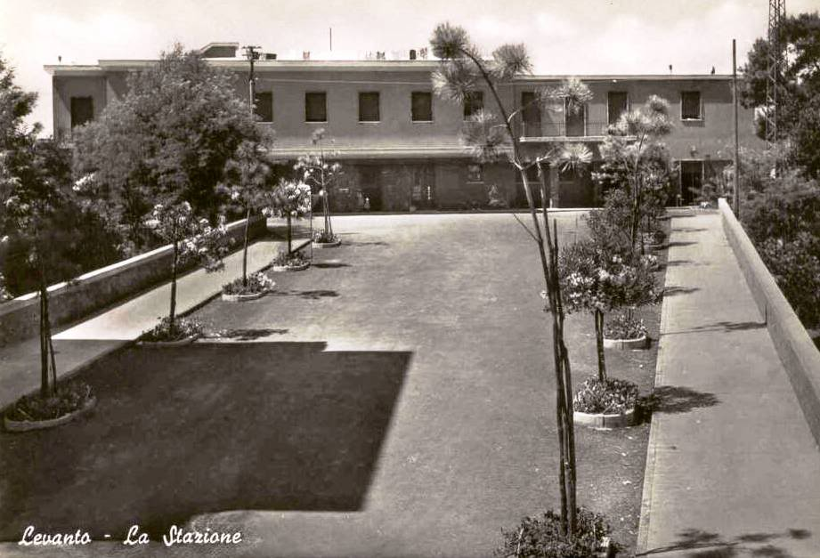 Il nuovo fabbricato viaggiatori della vecchia stazione di Levanto, completato nel 1949.